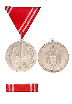 Srpski (latinica): Medalja za vojne zasluge